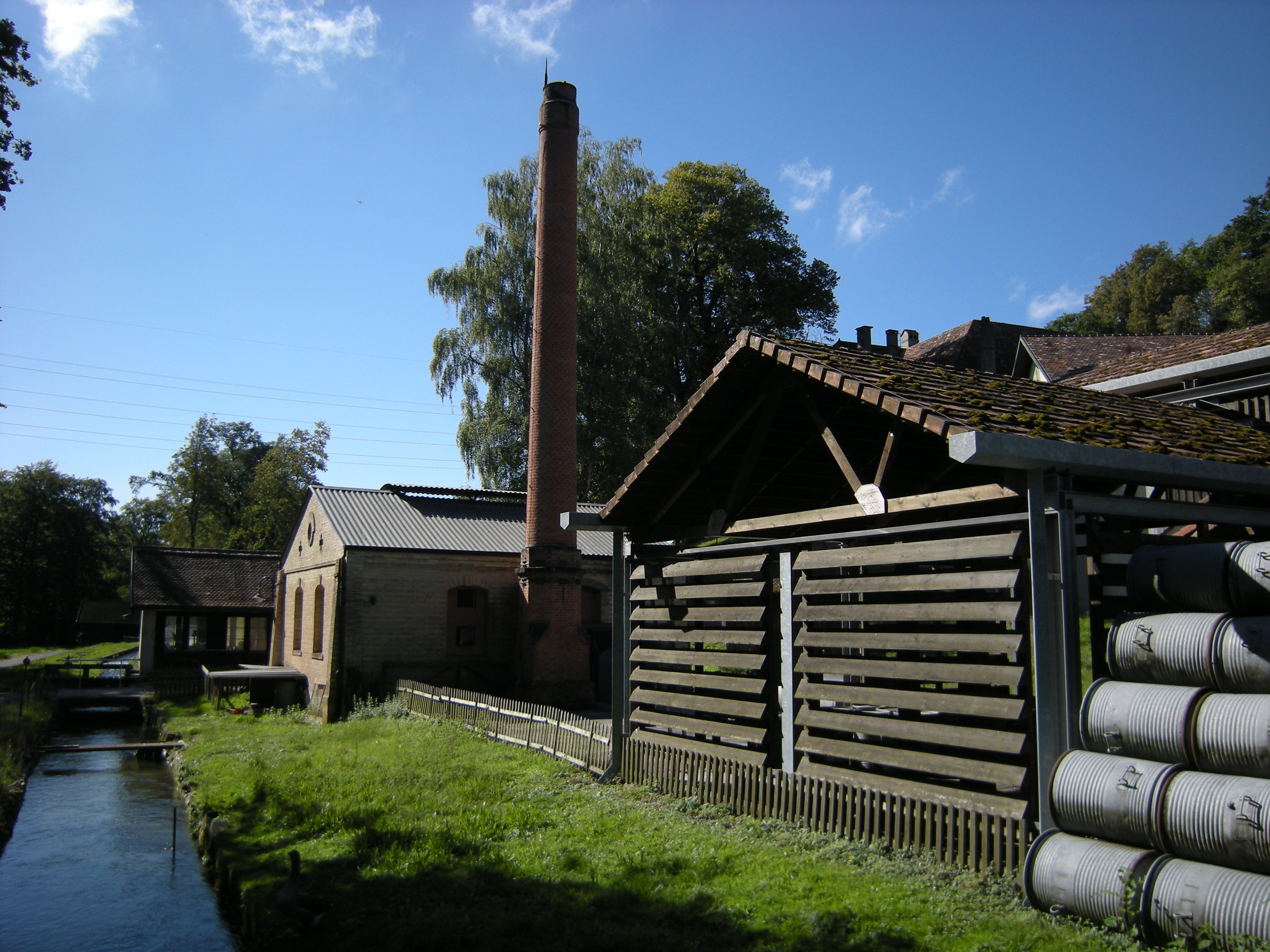 Ancienne Poudrerie Fédérale - Aubonne